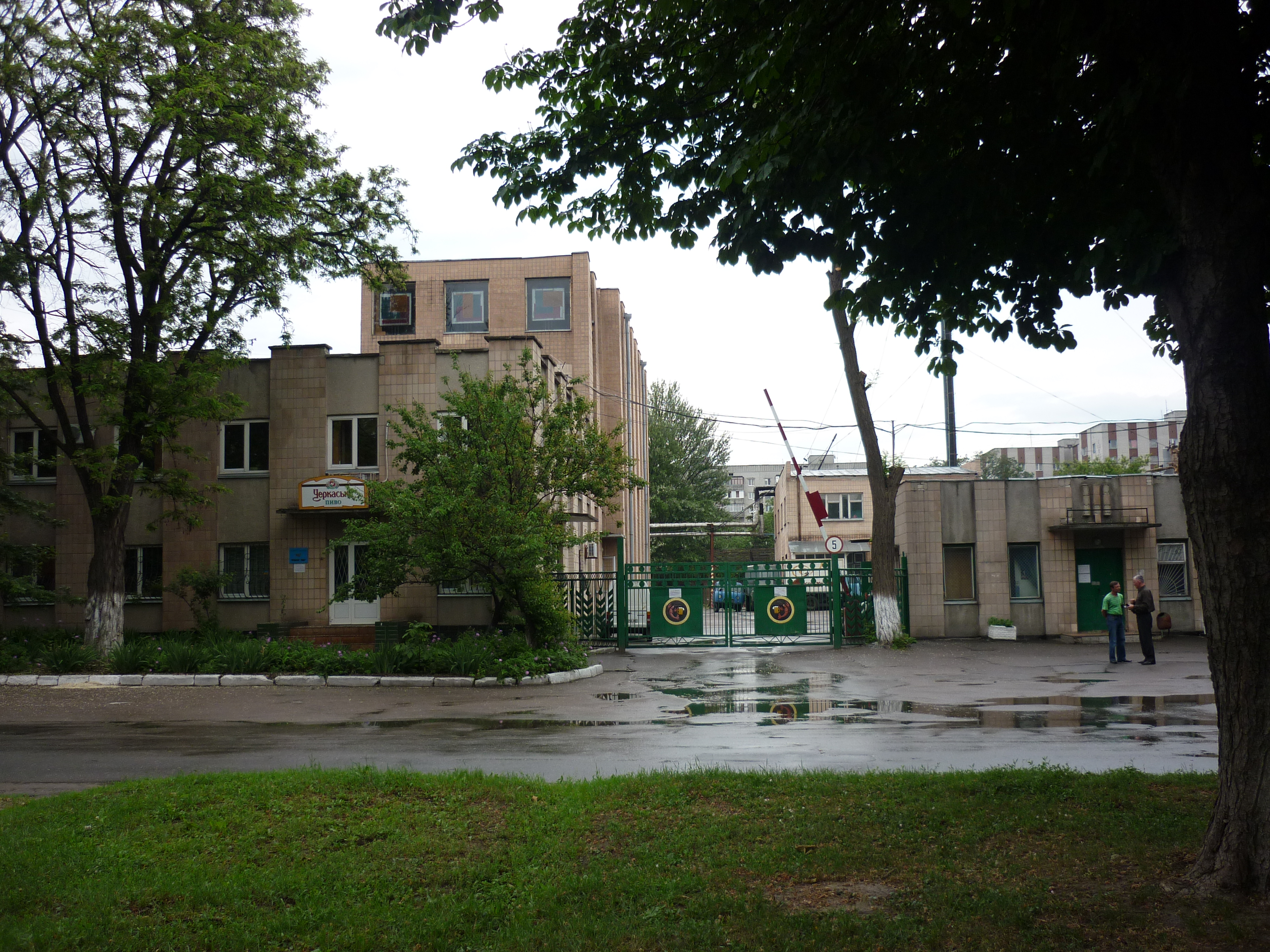 Черкаське пиво, центральний вхід